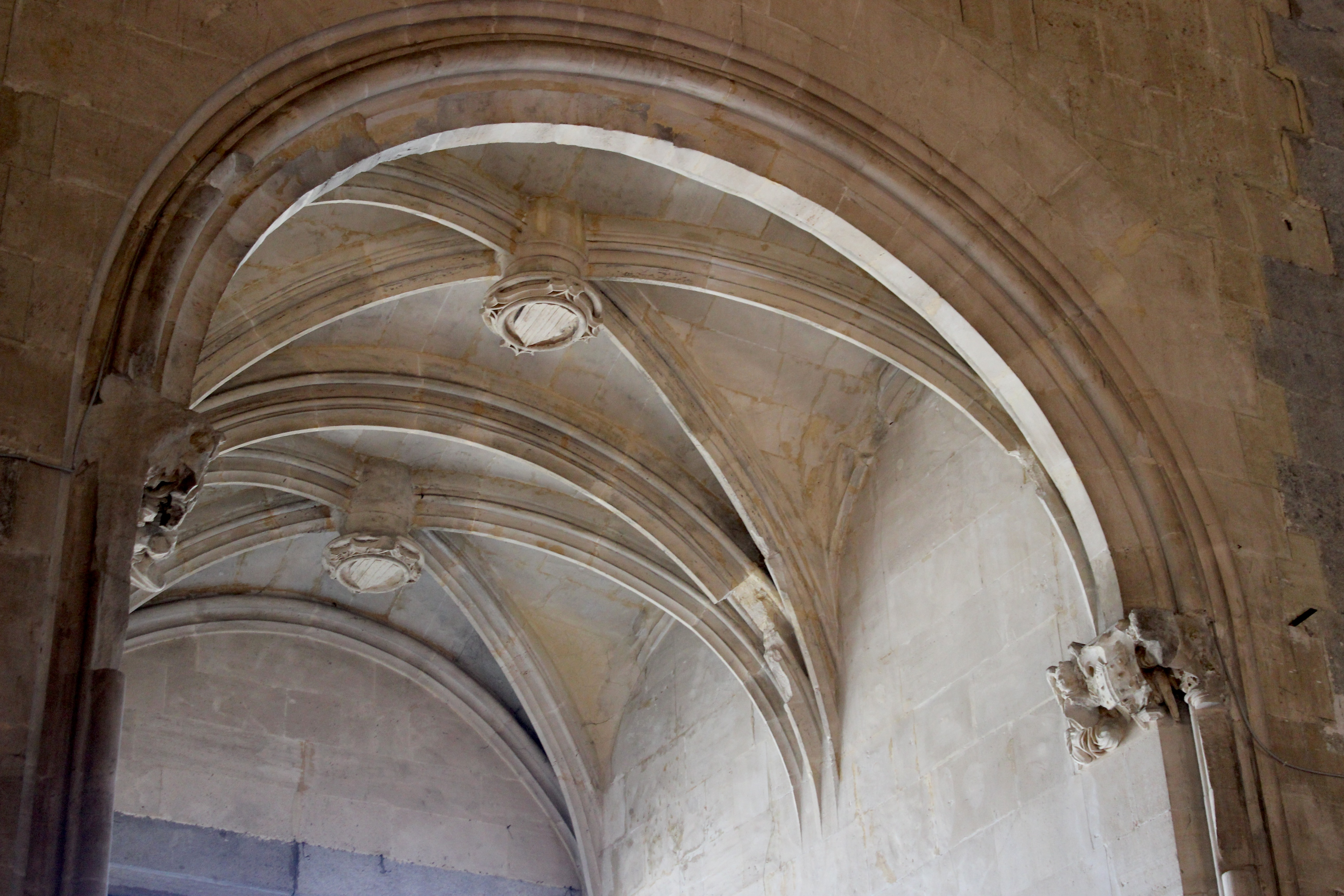 Castel Nuovo. Sala dei Baroni.